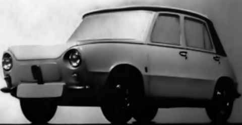 Model w skali 1:5 samochodu popularnego projektu Cezarego Nawrota dla FSO